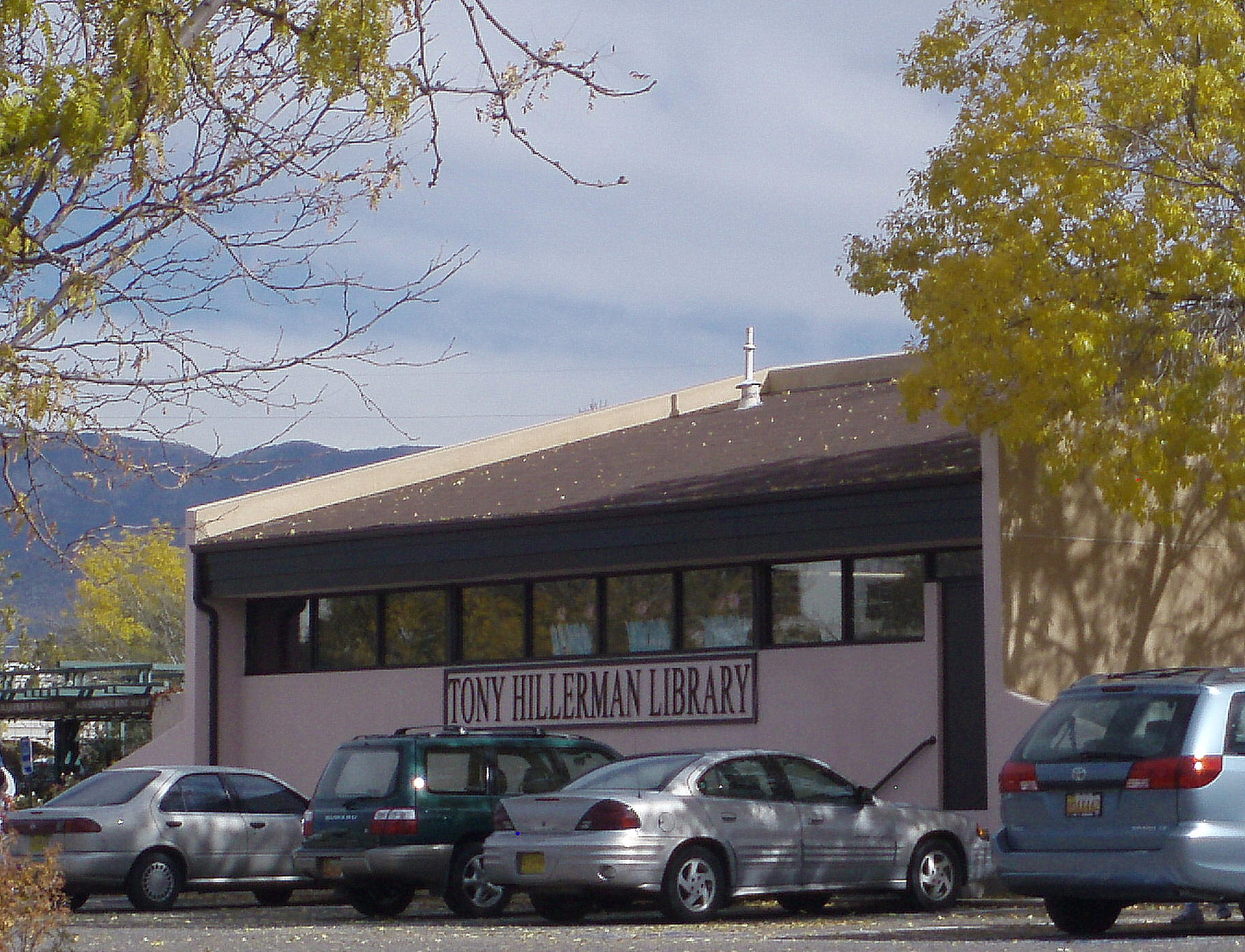 Tony Hillerman Library, Albuquerque, NM